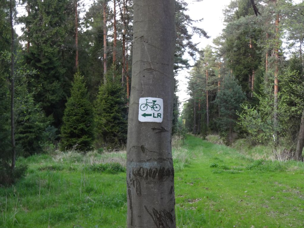 Leśno Rajza - oznaczenia trasy